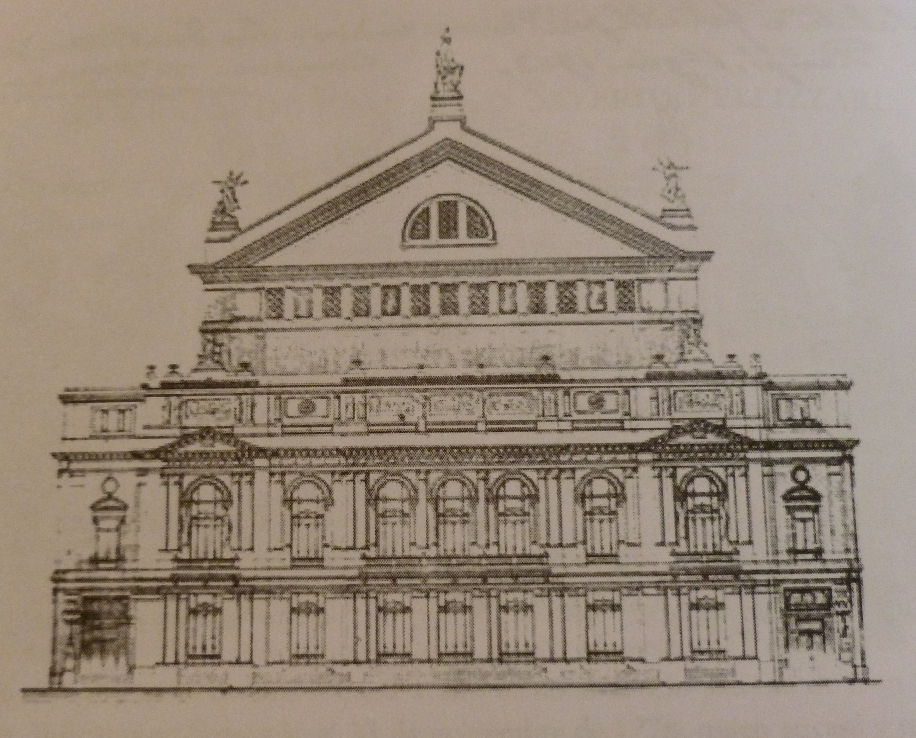 Teatro Colón. Diseño del frente realizado por Víctor Meano. 1892